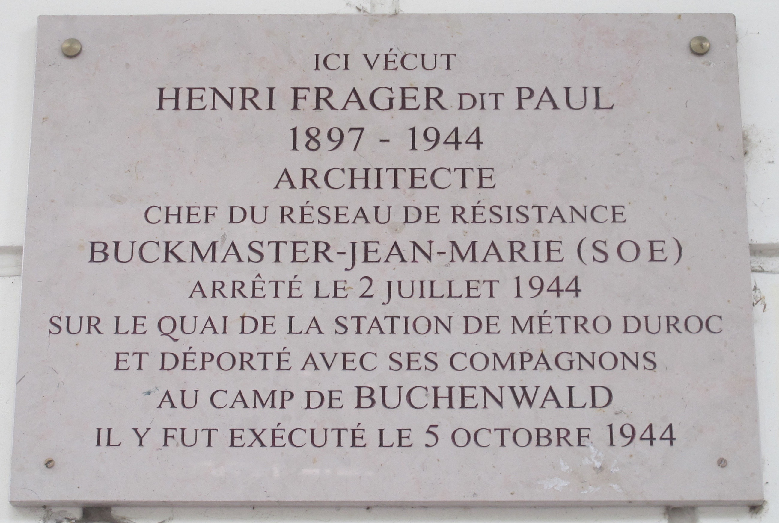 Plaque en hommage au résistant Henri Frager, qui vécut dans cet immeuble du 13 boulevard du Montparnasse (Paris, 6e).